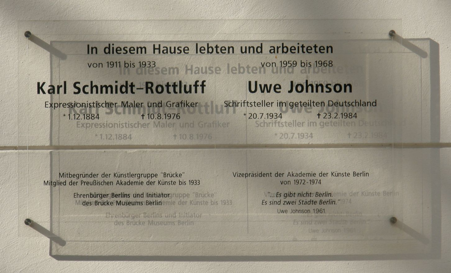 Gedenktafel für Karl Schmidt-Rottluff und Uwe Johnson. Niedstraße 14, Berlin-Friedenau